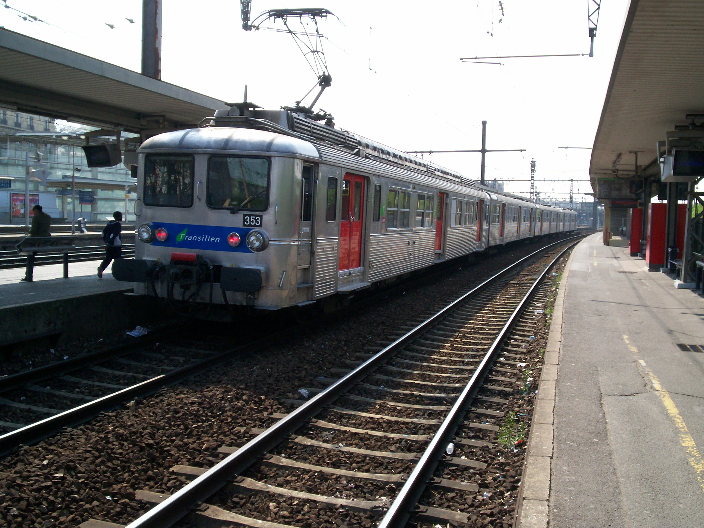 Gare de Villeneuve-Saint-Georges